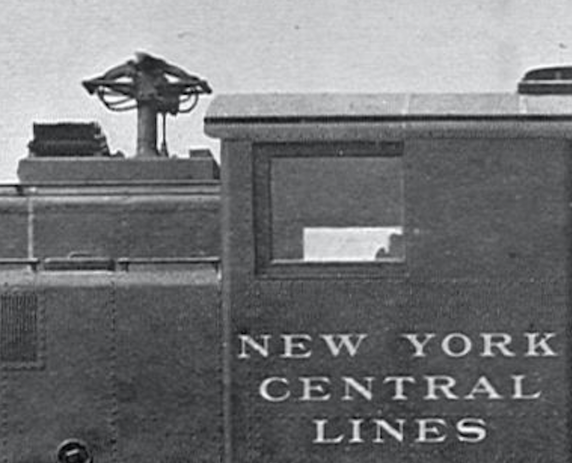 Grand Central Terminal tunnel pantograph, 1907